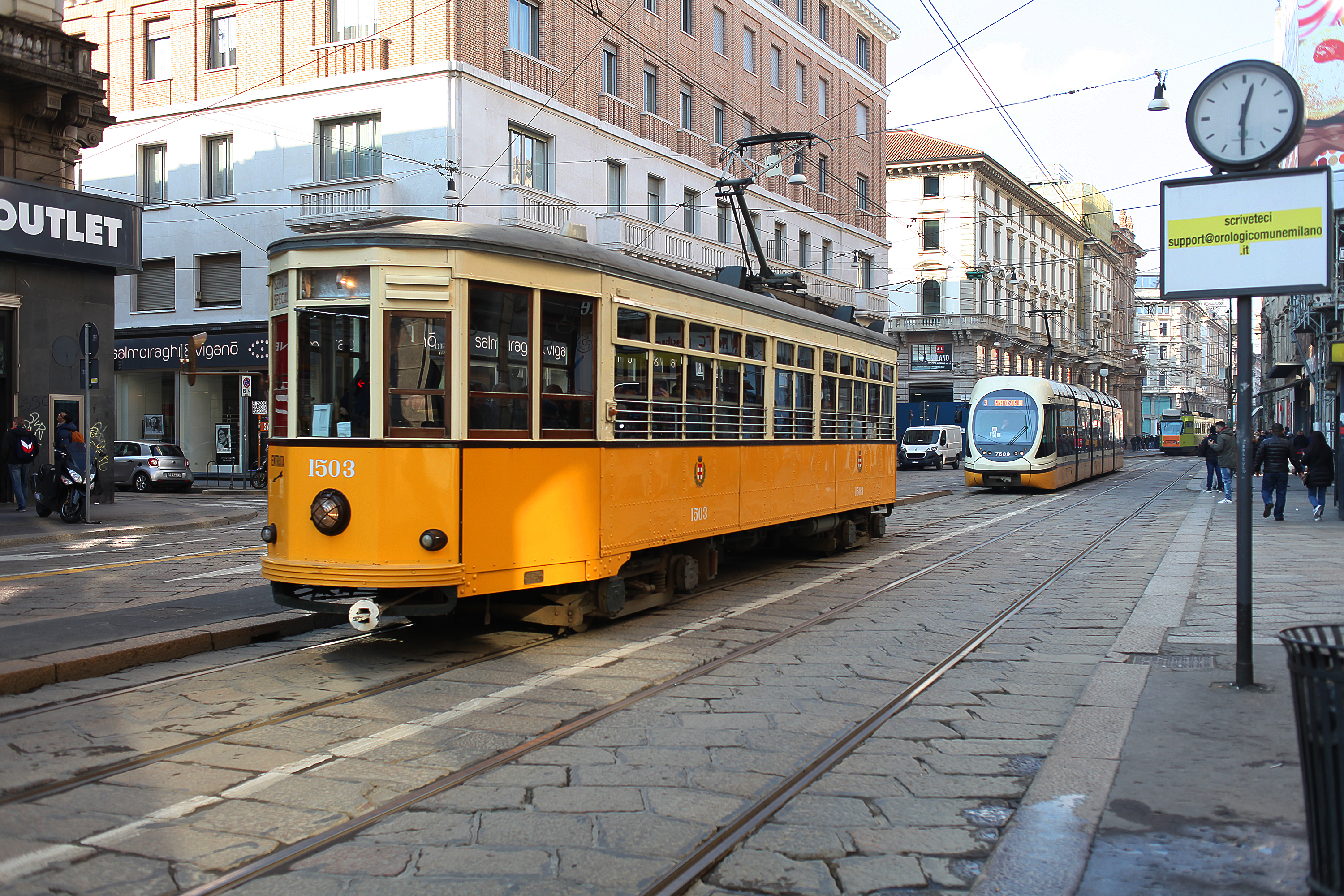 La vettura 1503 dell'ATM di Milano in transito in via Orefici a Milano